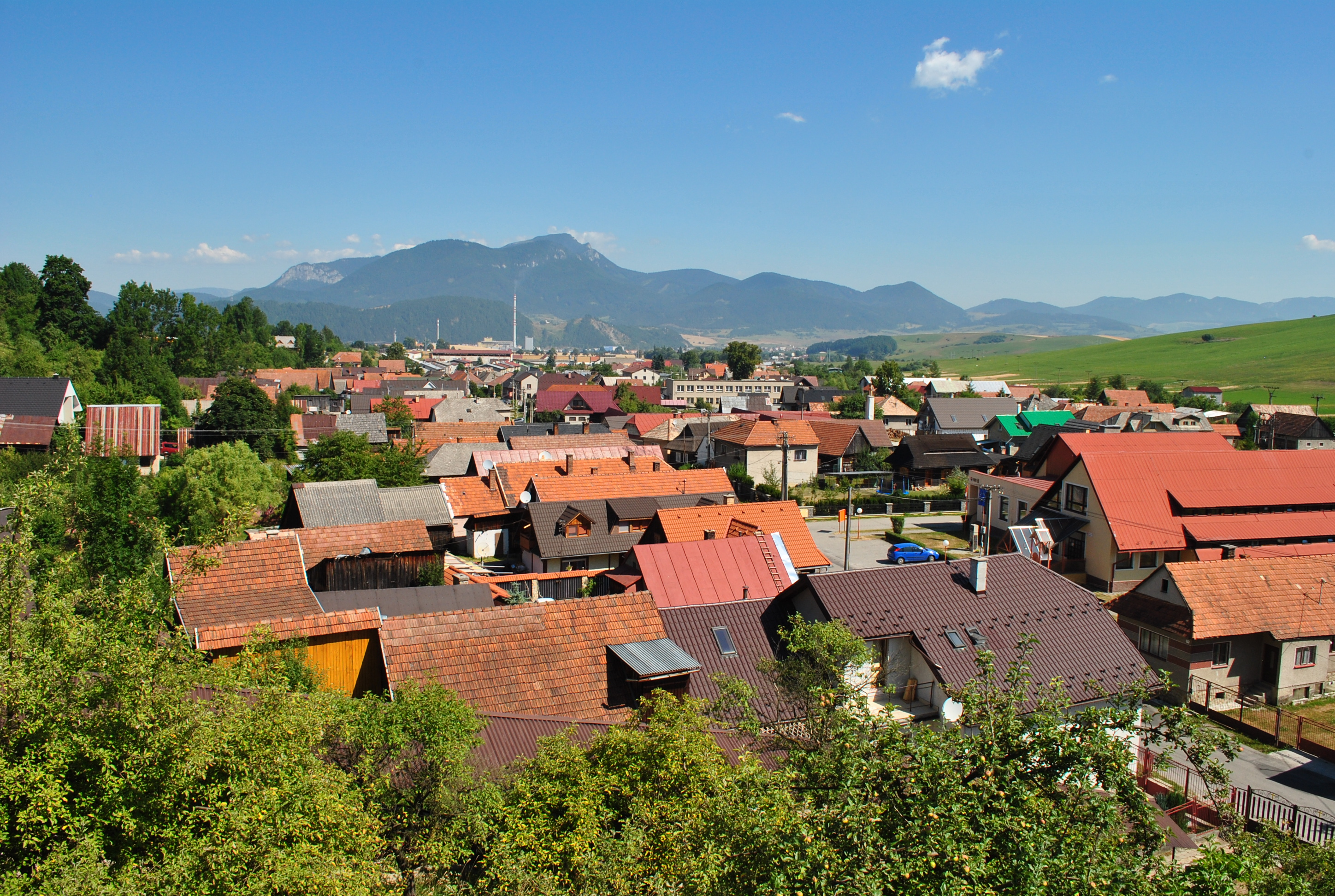 Ludrová, okr. Ružomberok - pohľad na obec od kostola smerom na sever